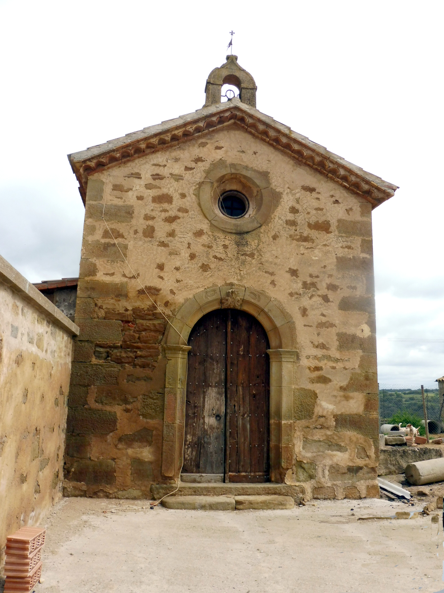 Mas d'en Porta (Guissona): capella de la Mare de Déu de la Llet This is a a photo of a natural area in Catalonia, Spain, with id: ES510216